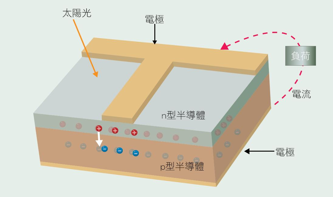 太陽能電池結構